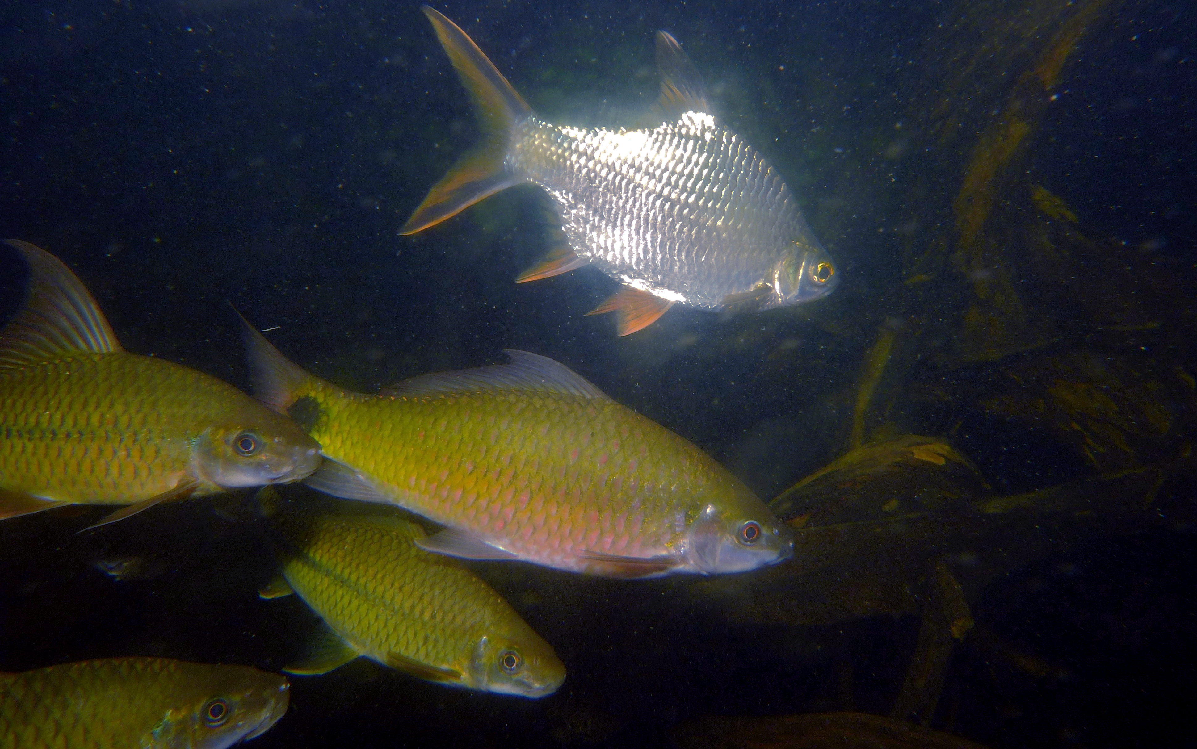 Headquarters Aquarium,Taman Negara NP, Pahang, MALAYSIA